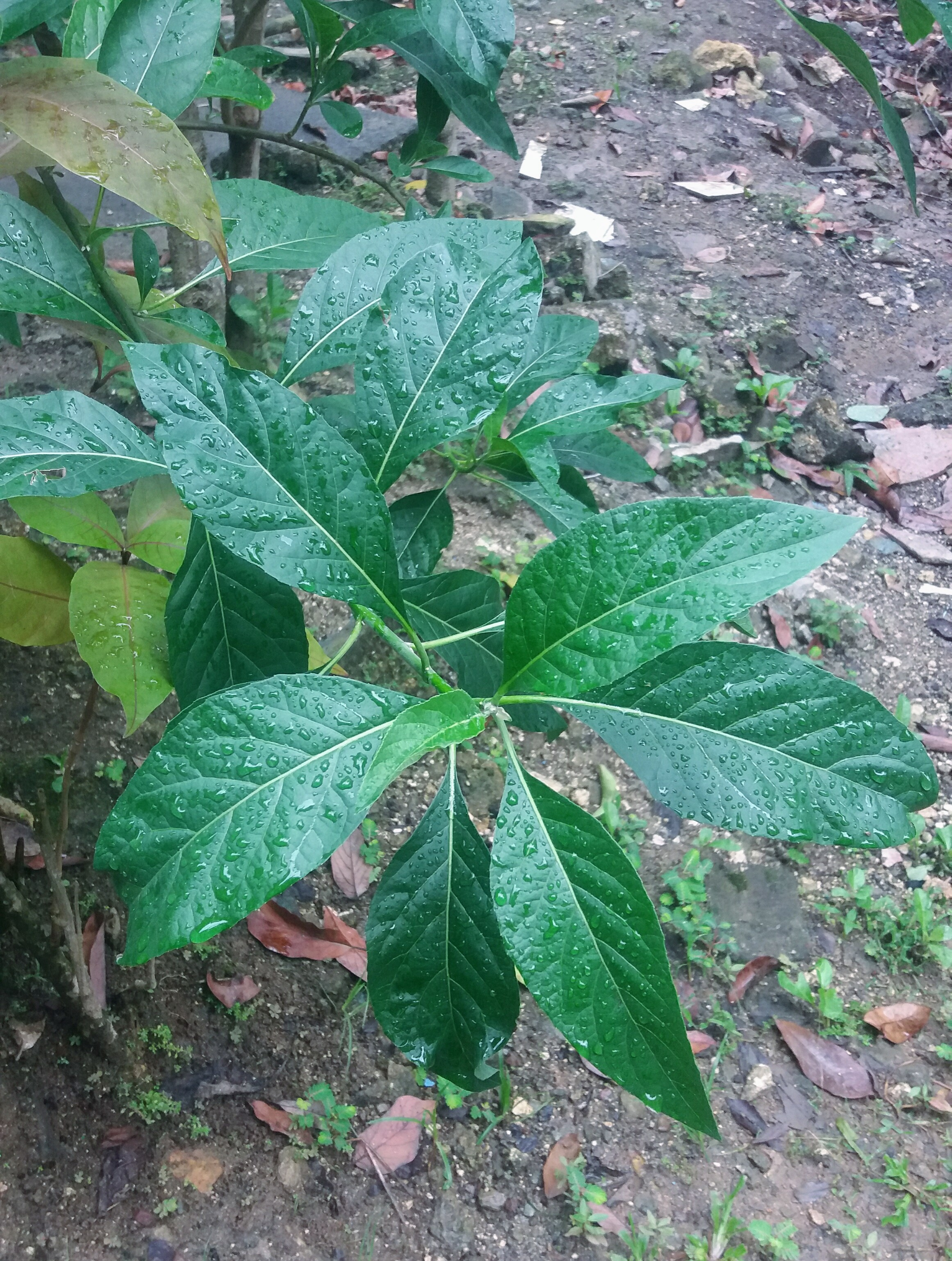 Daun afrika papua